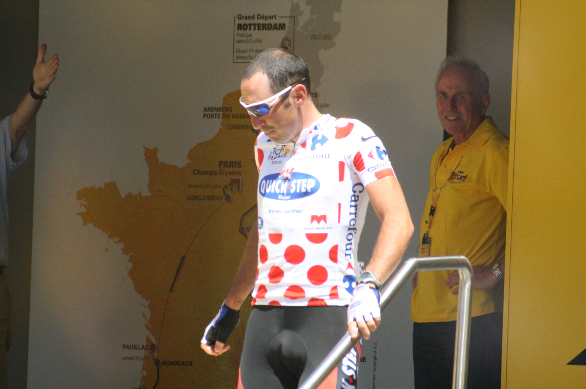 Départ de la 4e étape du Tour de France à Cambrai - Jérôme Pineau